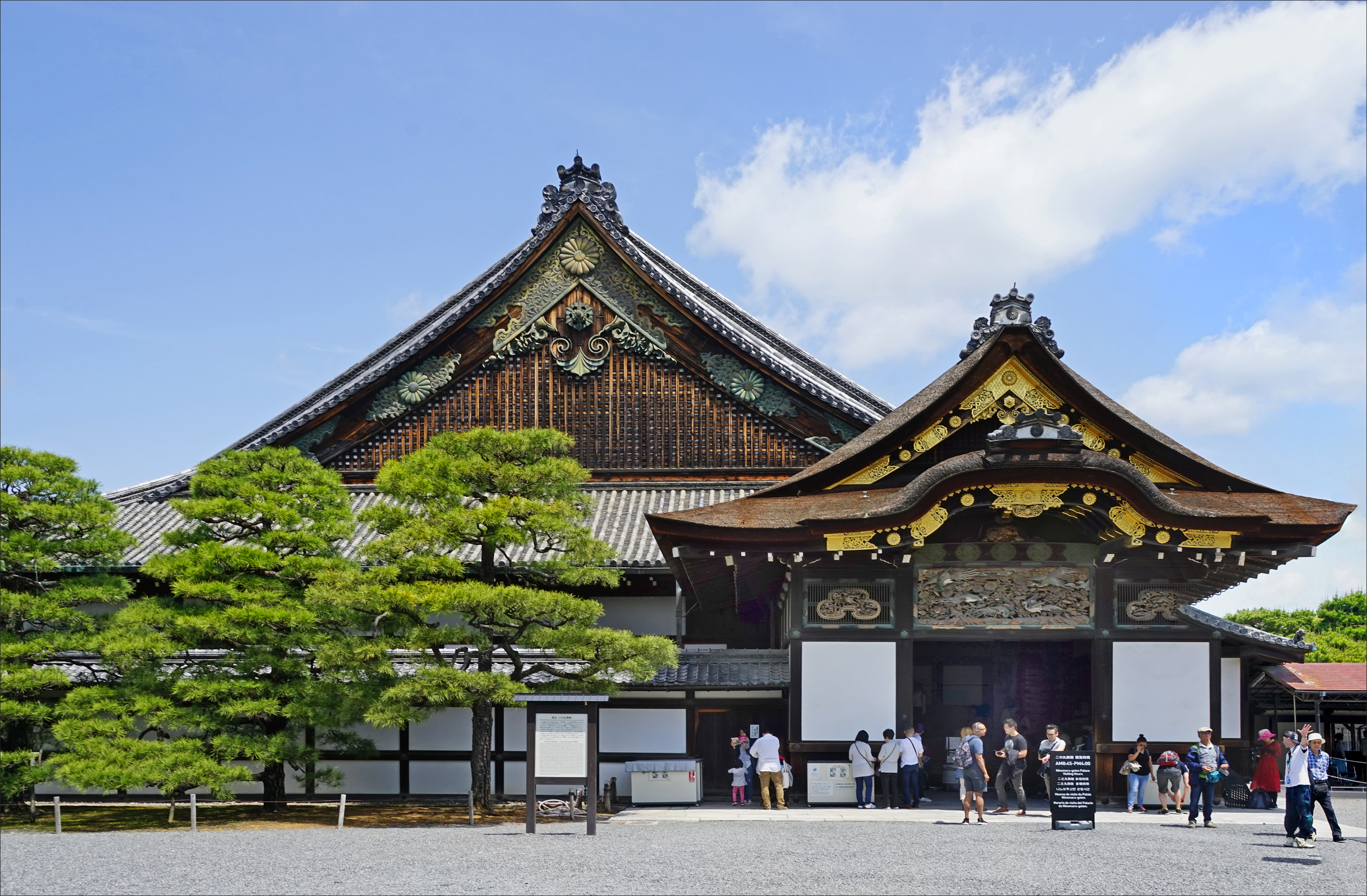 L'entrée du palais Ninomaru dans le château de Nijo à Kyoto Le château de Nijo a été construit en 1603 à Kyoto à proximité du palais de l'Empereur pour Ieyasu Tokugawa, le premier shogun (gouverneur) de la période Edo (1603-1867). C'était le lieu de résidence du shogun lors de ses séjours à Kyoto. Il comprend deux bâtiments : Honmaru et Ninomaru ainsi que de vastes jardins. Le palais Ninomaru est construit dans le style architectural shoin-zukuri, caractéristique des résidences des militaires. Influencé par le bouddhisme zen, il a été développé durant la période d'Edo. Le château de Nijo à Kyoto sur Wikipedia Le château de Nijo dans les guides du Japon